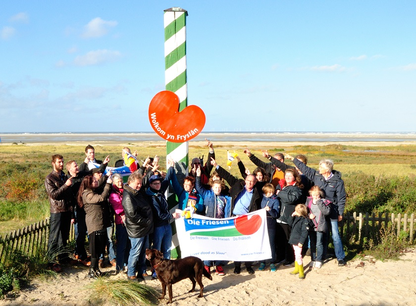 Jongfryske Mienskip op 24 oktober 2016 op Boarkum.